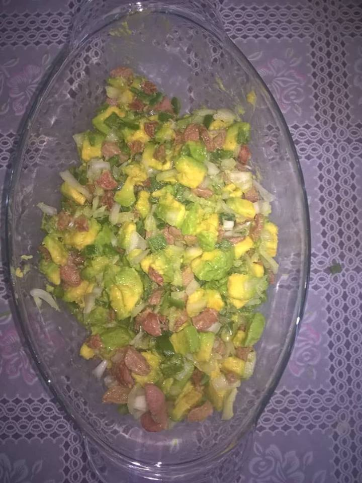 c'est une salade haitienne realisee a base d'avocat, d'ognon, de piment et d'ecrevisse